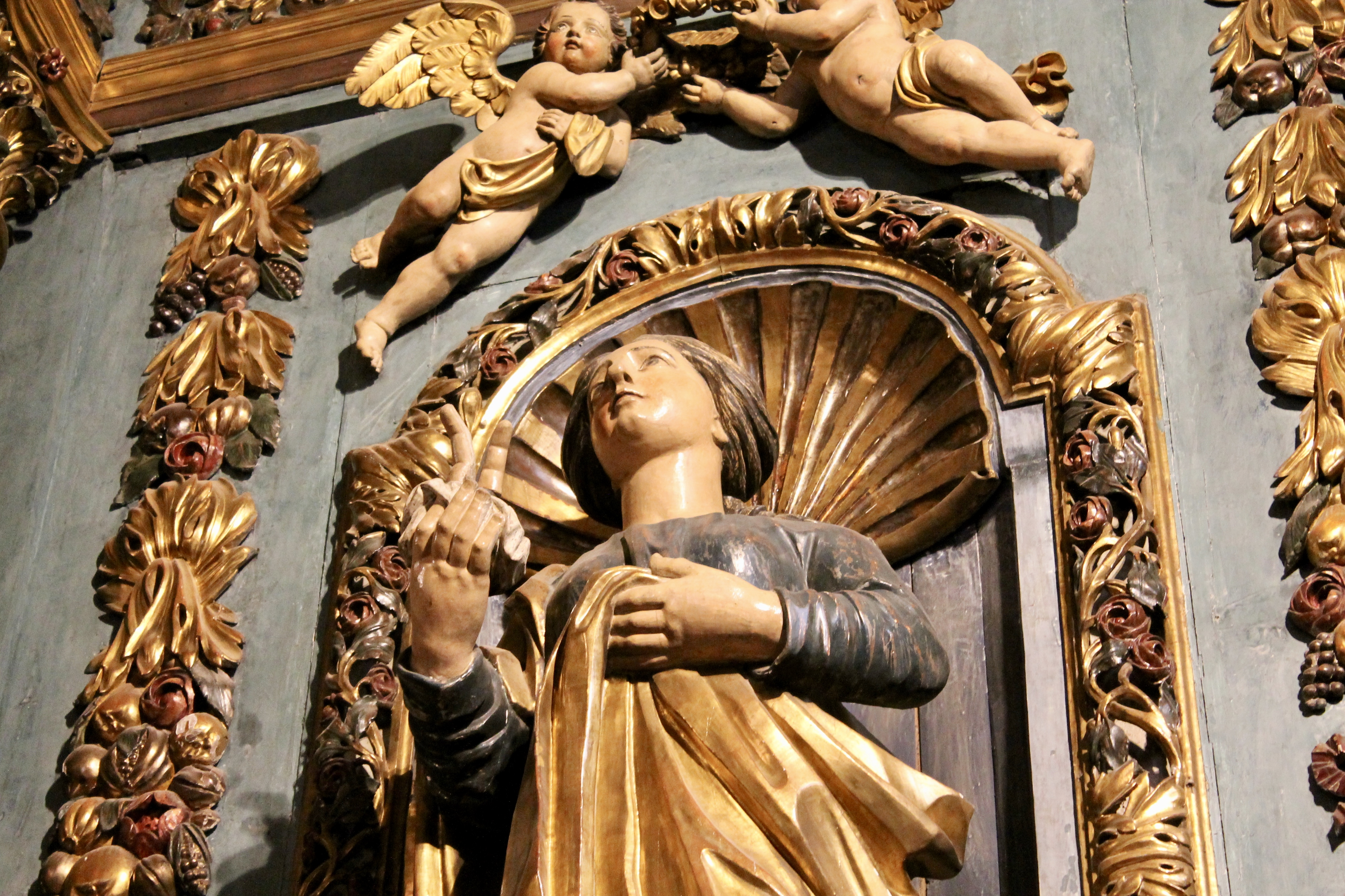 Statue en bois de sainte Thècle de Valloire, détails du retable du maître autel (août 2018).